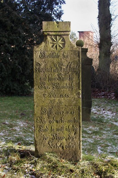 Grabstein - Kirchhof Seester